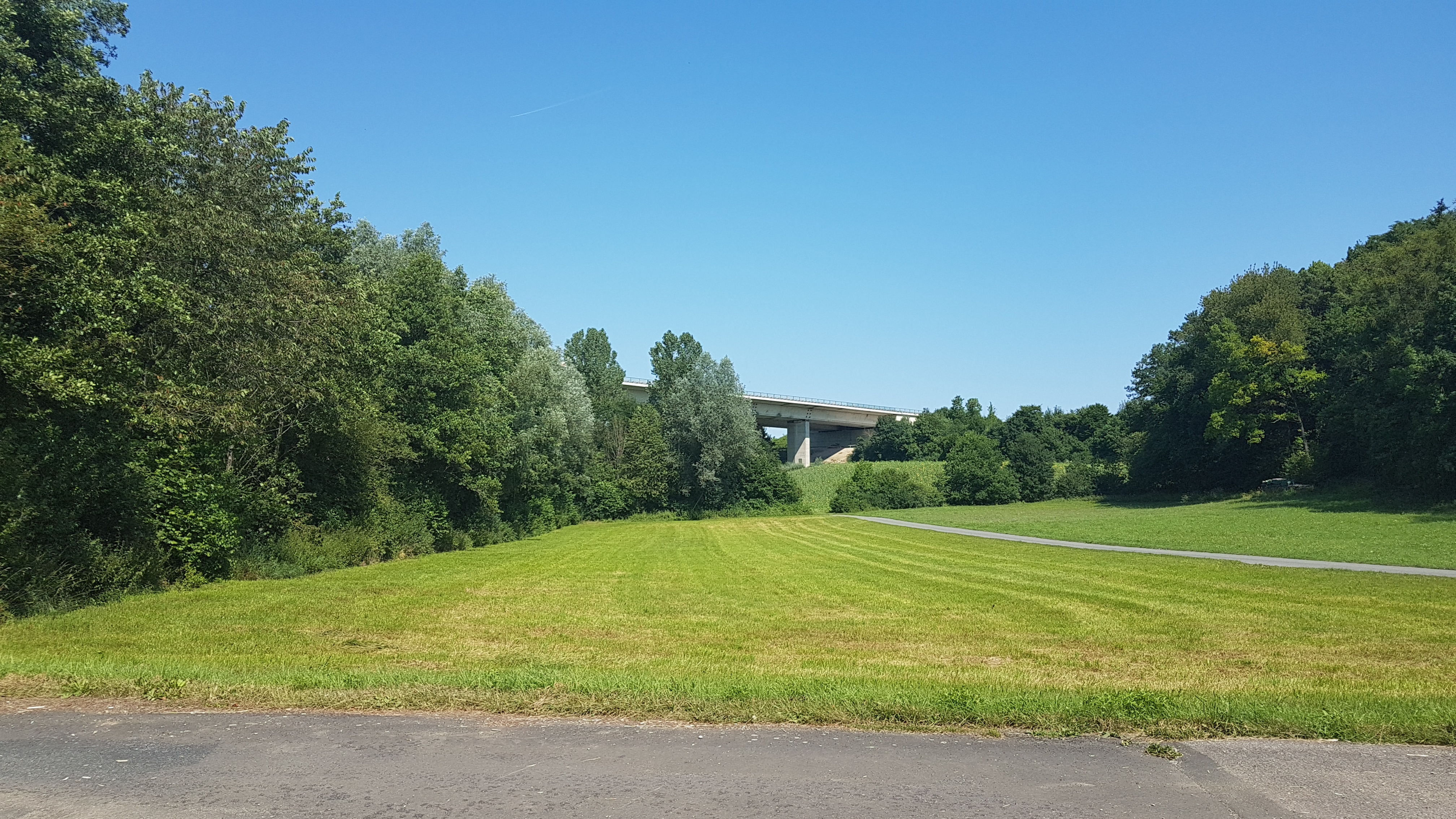 Der Schüpfbachtalradweg. Im Hintergrund die Schüpfbachtalbrücke. Direkt dahinter befindet sich der große und kleine Heckfelder See.